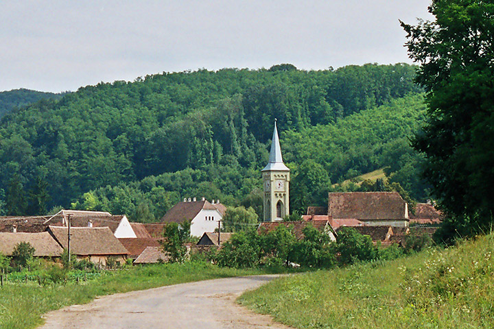 Nemşa - Nimesch